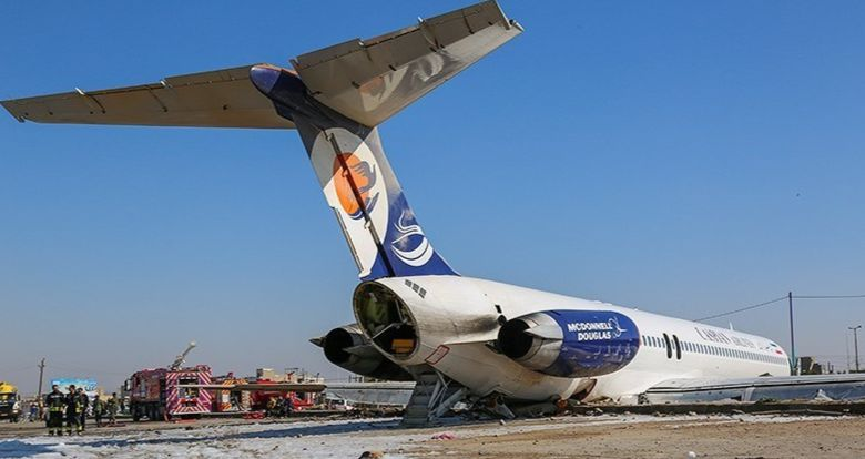 هواپیما حادثه دیده شرکت هواپیمایی کاسپین در فرودگاه ماهشهر -بهمن ۱۳۹۸